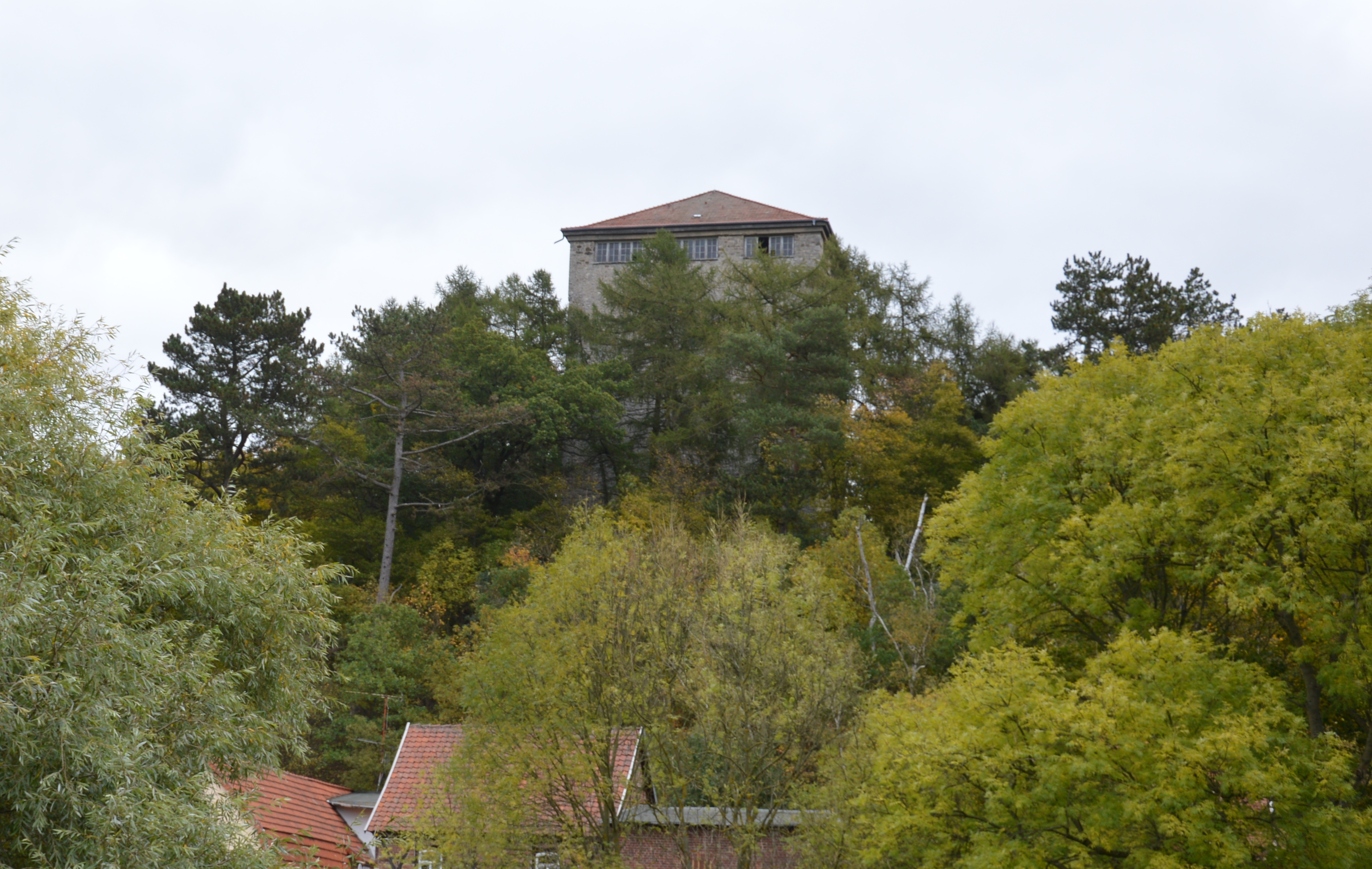 Wassertum Ehrenberg Harzgerode